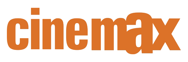 Cinemax logója HBO tulajdona.